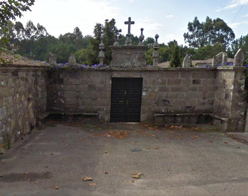 Pazo de Brito portalón